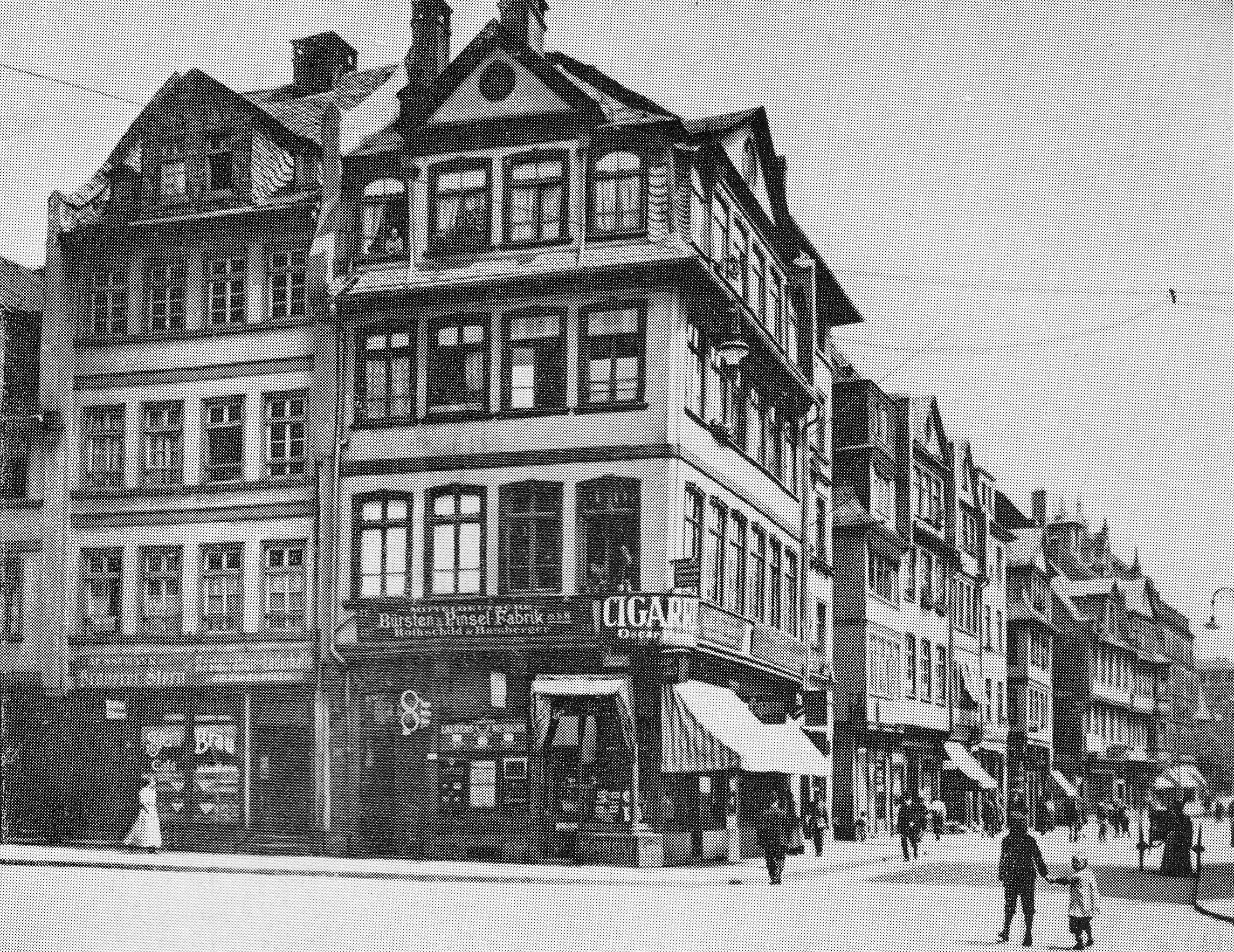 Das ehemalige Zunfthaus der Frankfurter Kürschner, Schnurgasse Ecke Triersche Gasse. Aufgenommen im Jahr 1915. Der Kaufpreis für das „Haus Zeilsheim“ im Jahr 1524 betrug 100 Gulden und wurde einem jahrelang dafür angesammelten Fond entnommen. Das Haus war jedoch baufällig und die Kürschner ließen es niederlegen und an seiner Stelle einen stattlichen Neubau errichten. Der Bau des schönen Zunfthaus überstieg jedoch ihre Mittel und sie mussten eine Hypothek aufnehmen. Das Haus bestand bis 1944.